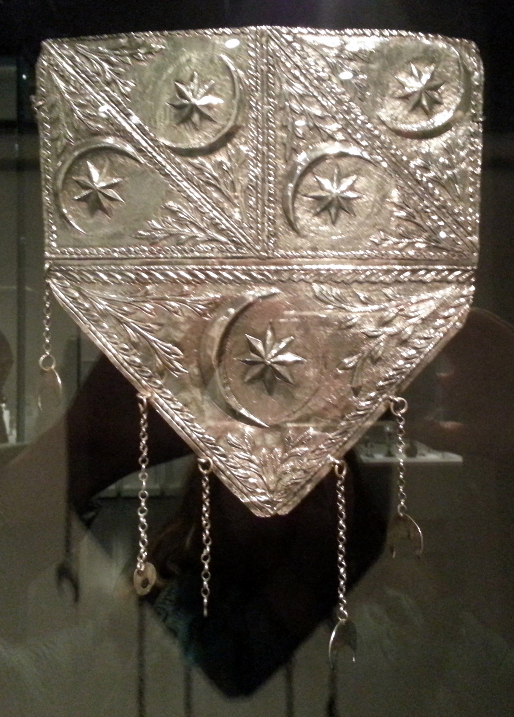 מגן לספר תורה עשוי כסף, ומרוקע דימויי סהר, יהדות טורקיה. צולם במוזיאון ישראל